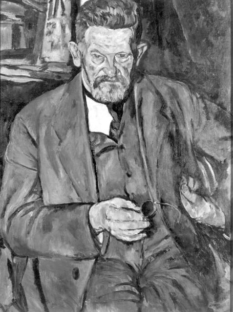 Heinrich Zille (* 10. Januar 1858; † 9. August 1929), deutscher Grafiker, Lithograf, Maler, Zeichner und Fotograf.